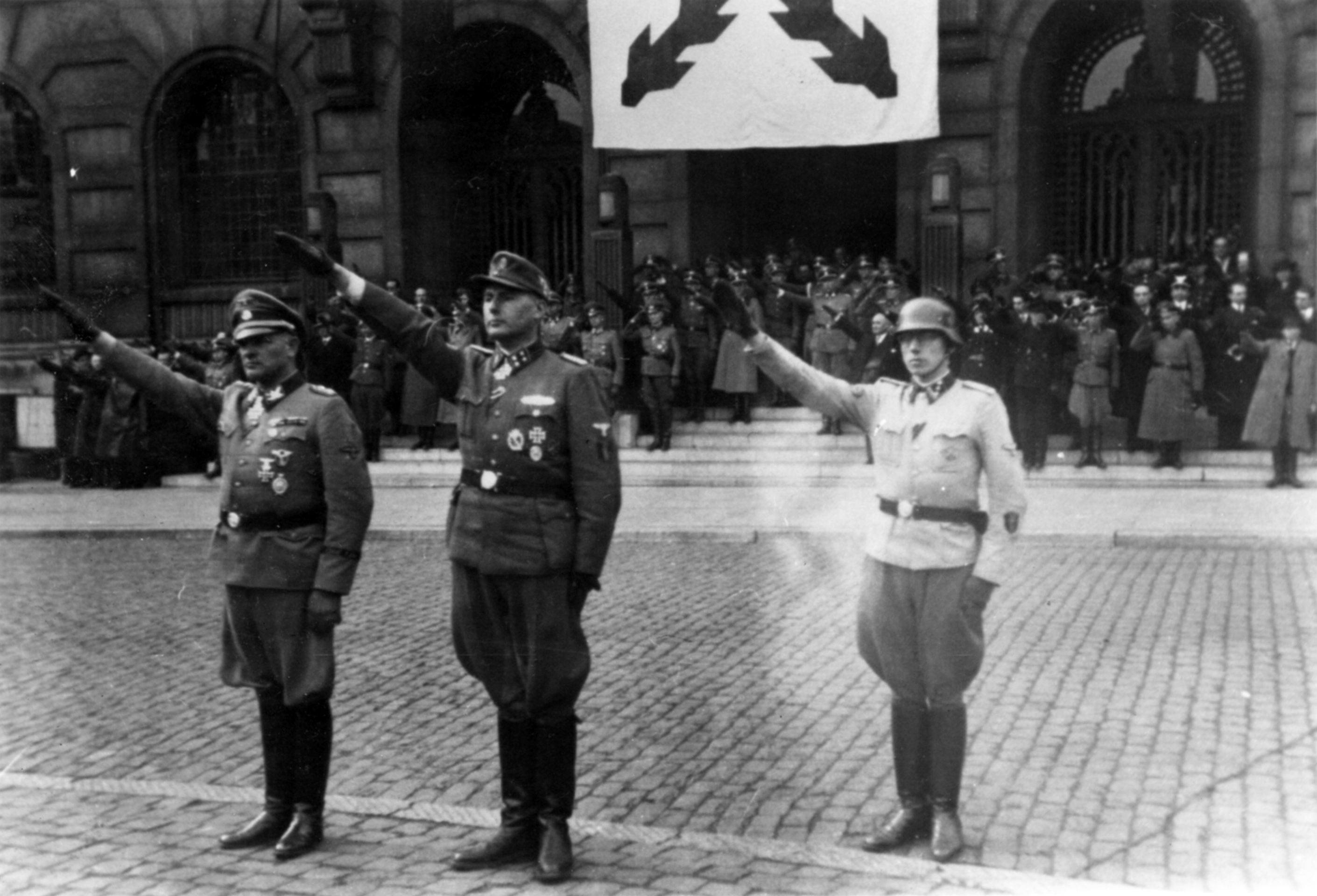 Léon Degrelle à Charleroi (Belgique) 1 avril 1944 De gauche à droite : Josef Dietrich Léon Degrelle Jean Vermeire (1918-2009)